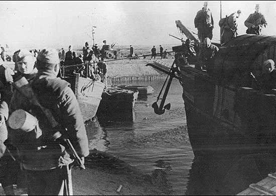 Подразделение десантников перед отплытием к берегам Керченского пролива в ходе Керченско-Эльтигенской десантной операции. Ноябрь 1943 года.